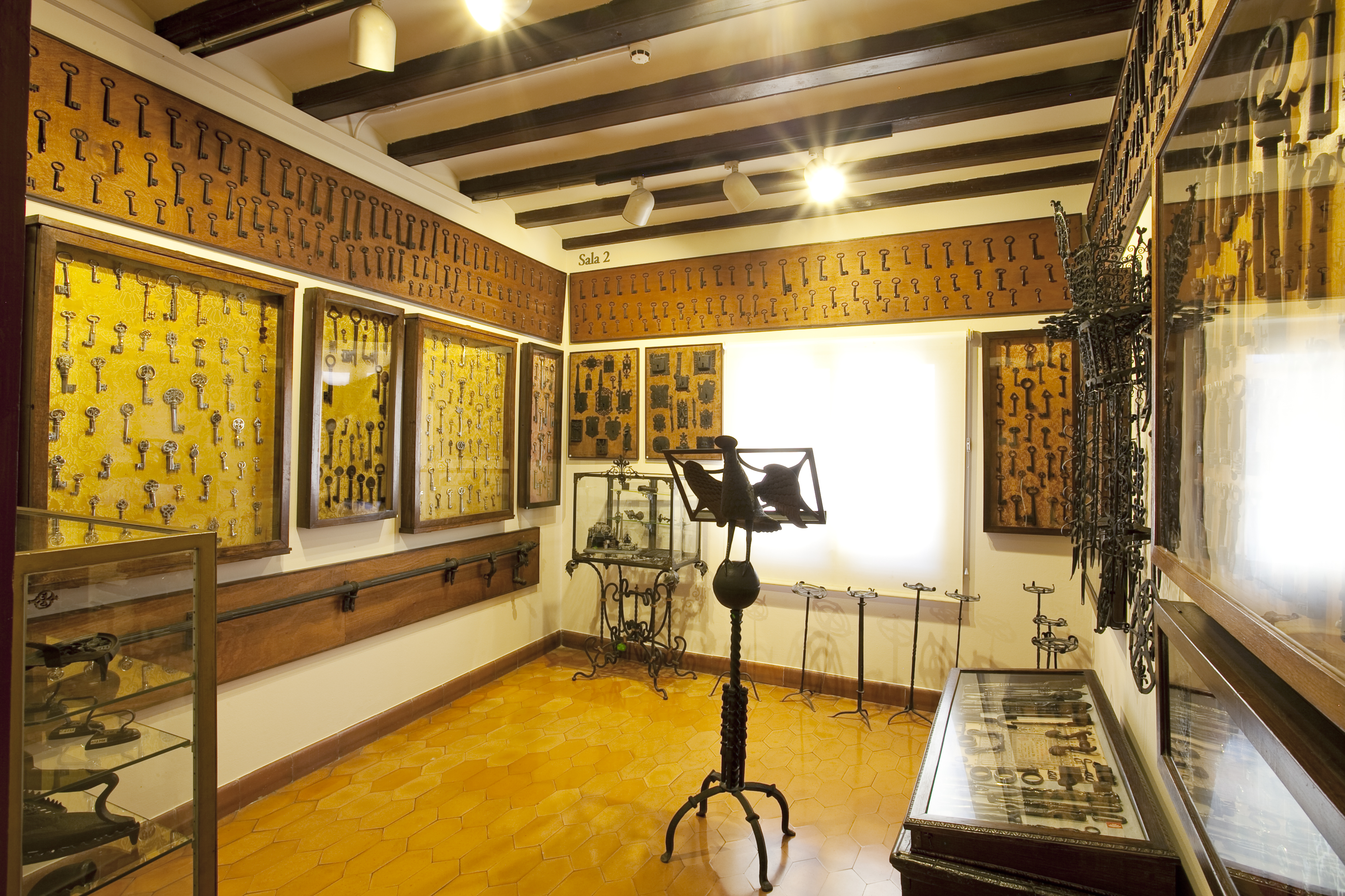 1 i 2 Gabinet col·leccionista - Fot. GUILLEM F-H.jpg